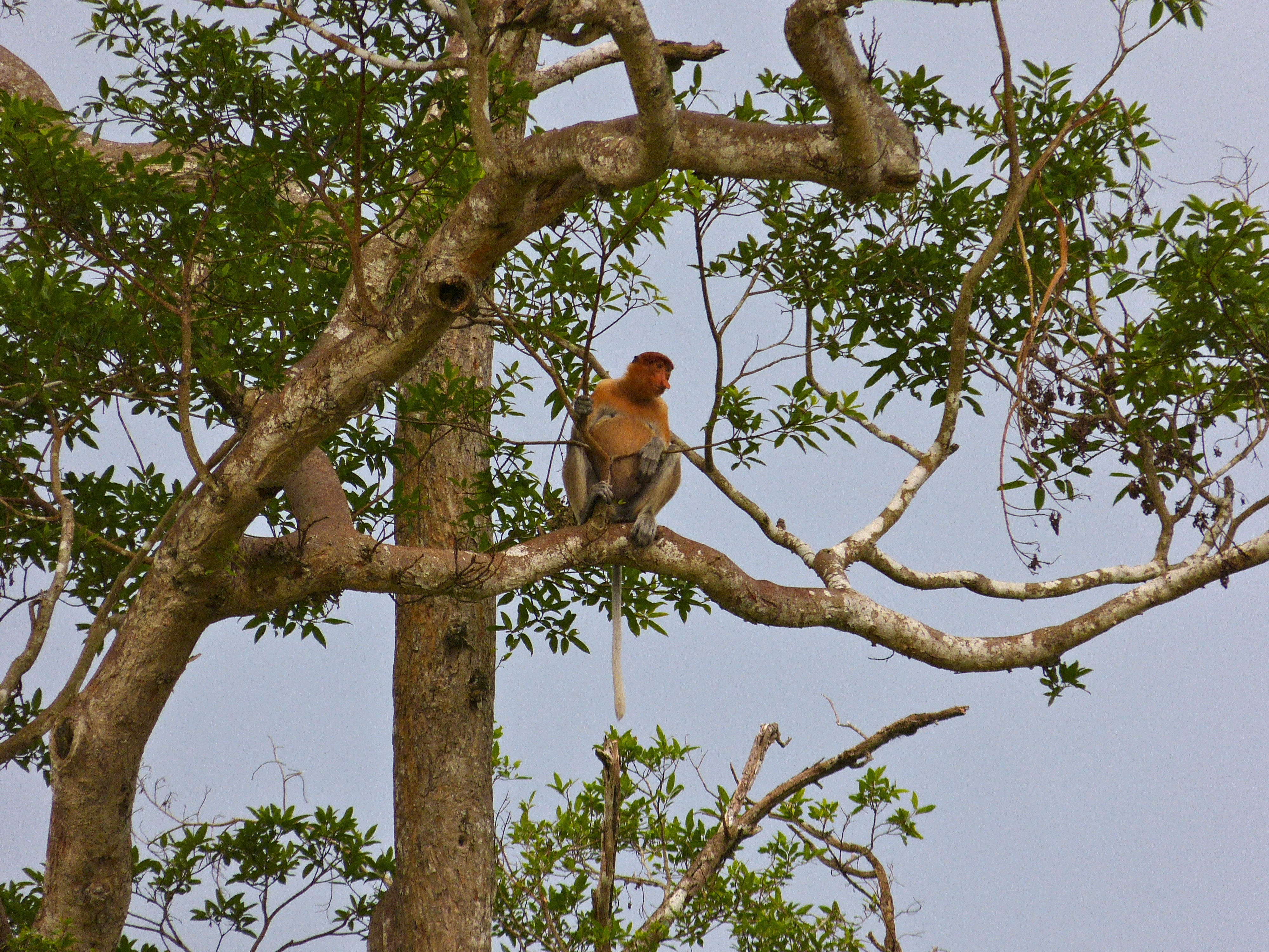 Kinabatangan River, Sukau, Sabah, MALAYSIA